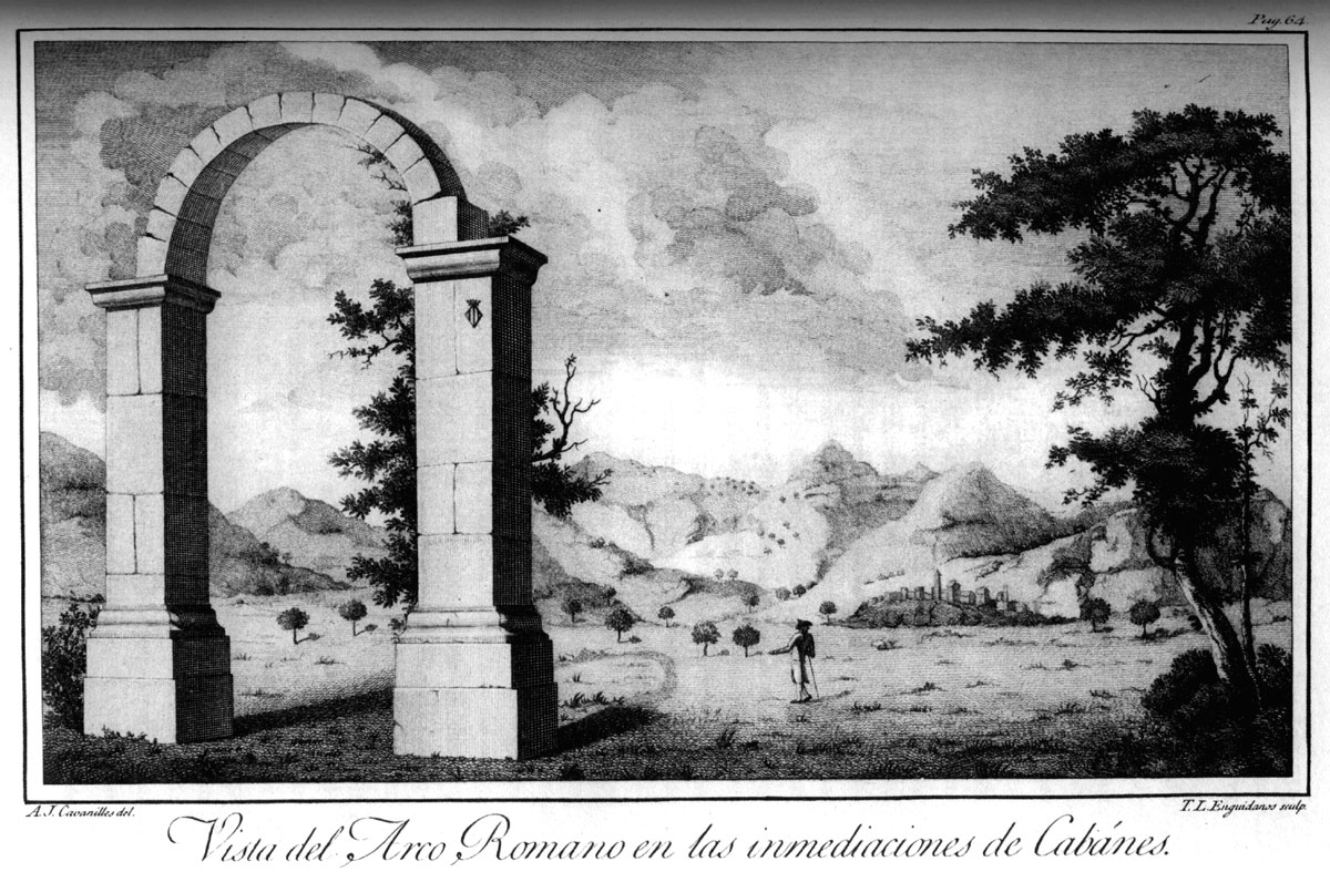 Gravat del dibuix fet per Antoni Josep cavanilles (1745-1804) de l'Arc romà de Cabanes.